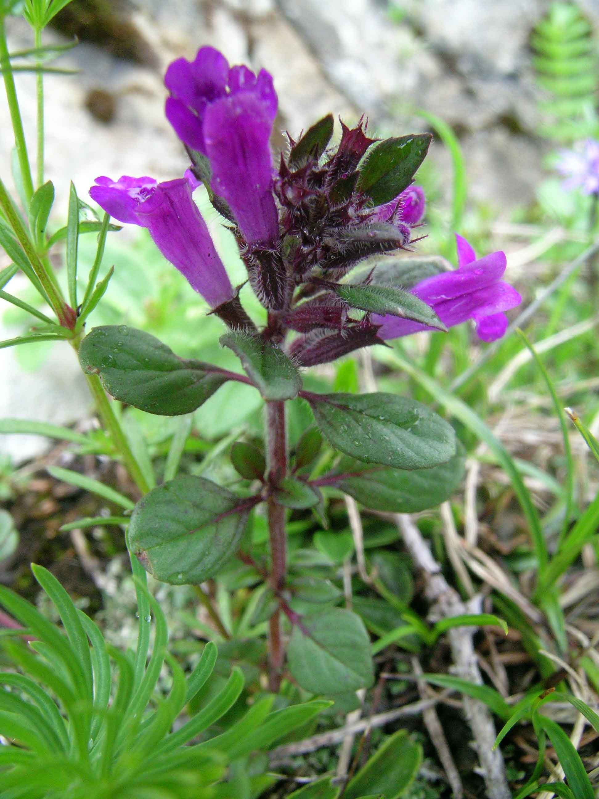 Acinos alpinus, Schynige Platte, Kanton Bern, Schweiz